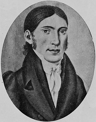 Johann Friedrich Wilhelm Pustkuchen (1793–1834), reformierter Theologe und Literat